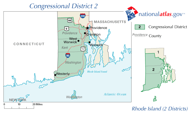 a map